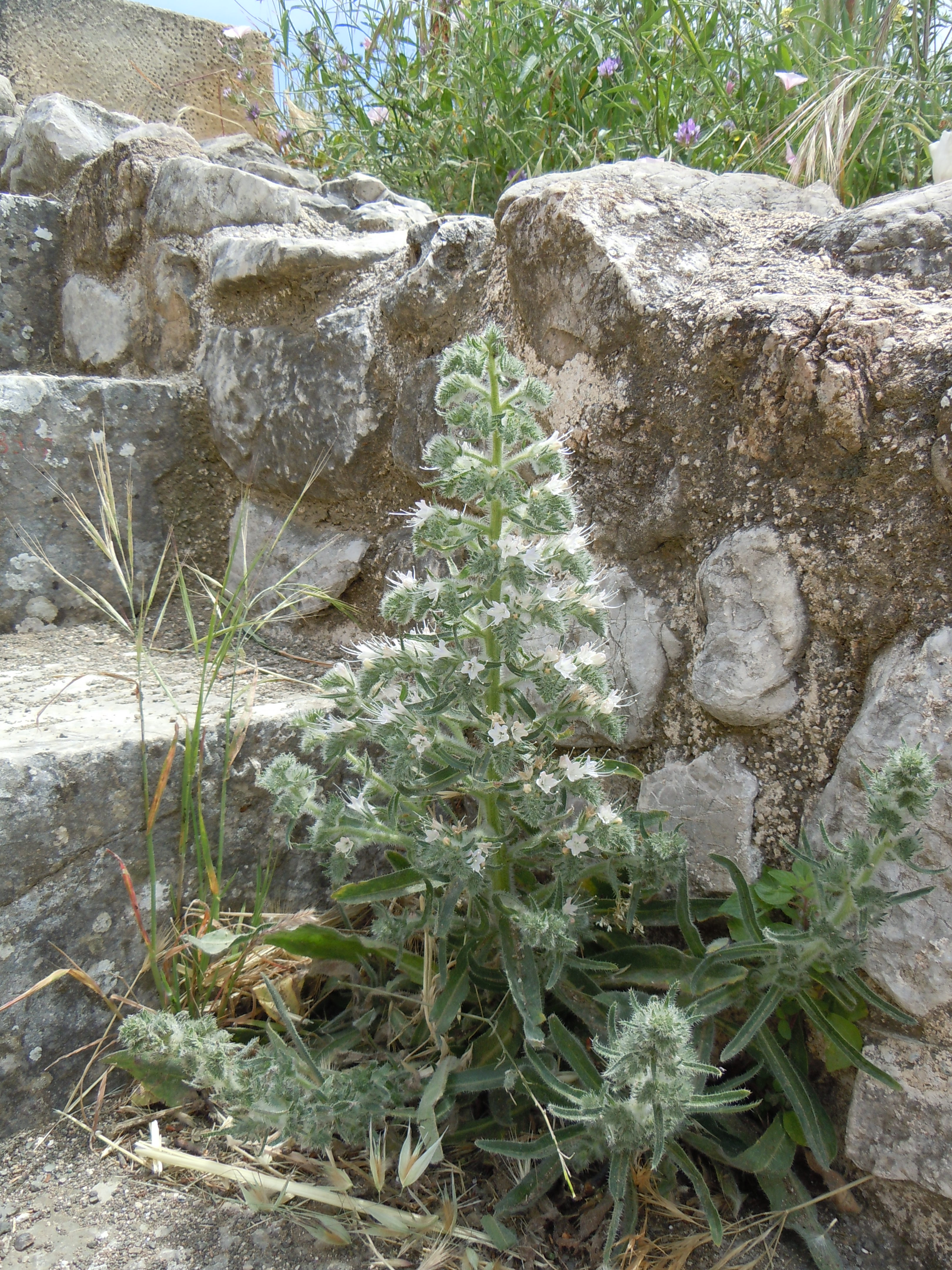 Echium italicum à Epidaure